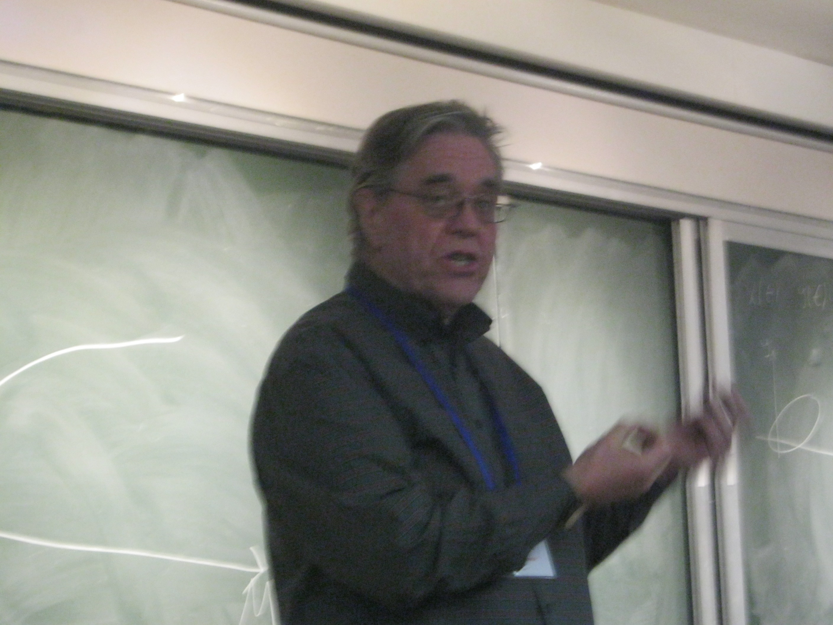 David J. Stevenson, 2015